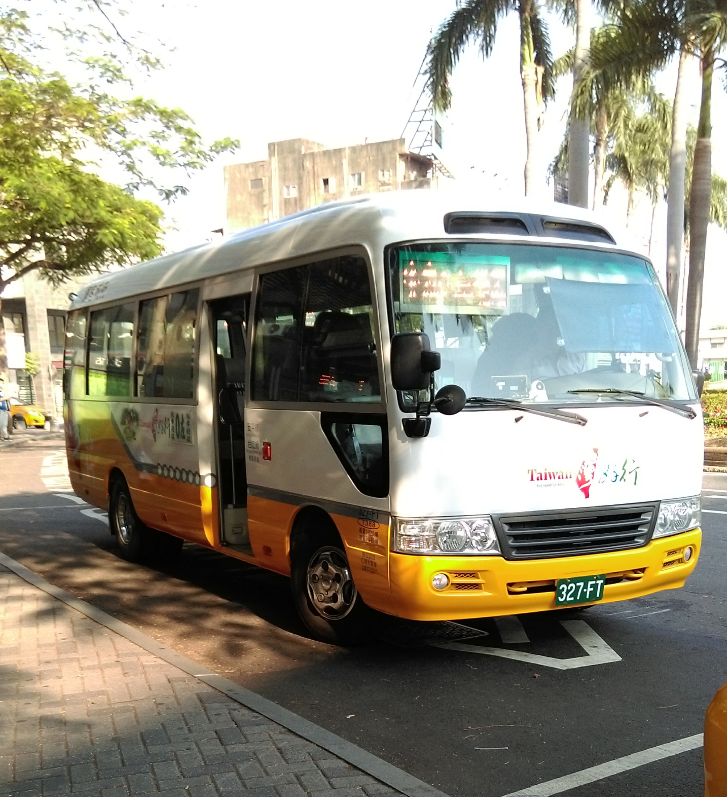 中文（台灣）: 府城客運豐田Coaster中巴327-FT(台灣好行塗裝)行駛大台南公車0左，於台南火車站(北站)自行拍攝